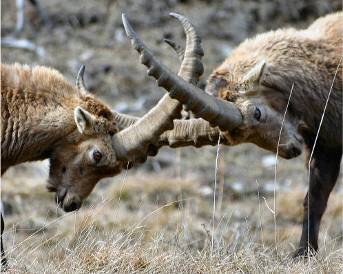 Deux jeunes bouquetins mâles au combat. Aussois, le 25/03/2006. Auteur : Aurélien LE METAYER.